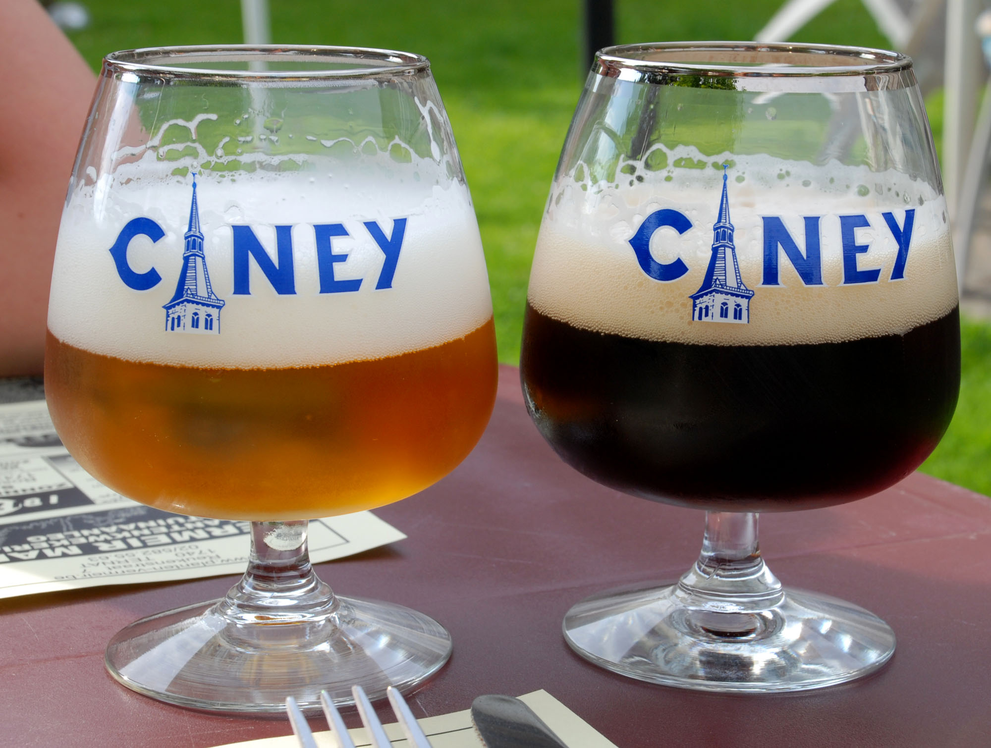 Ciney Blond en Bruin